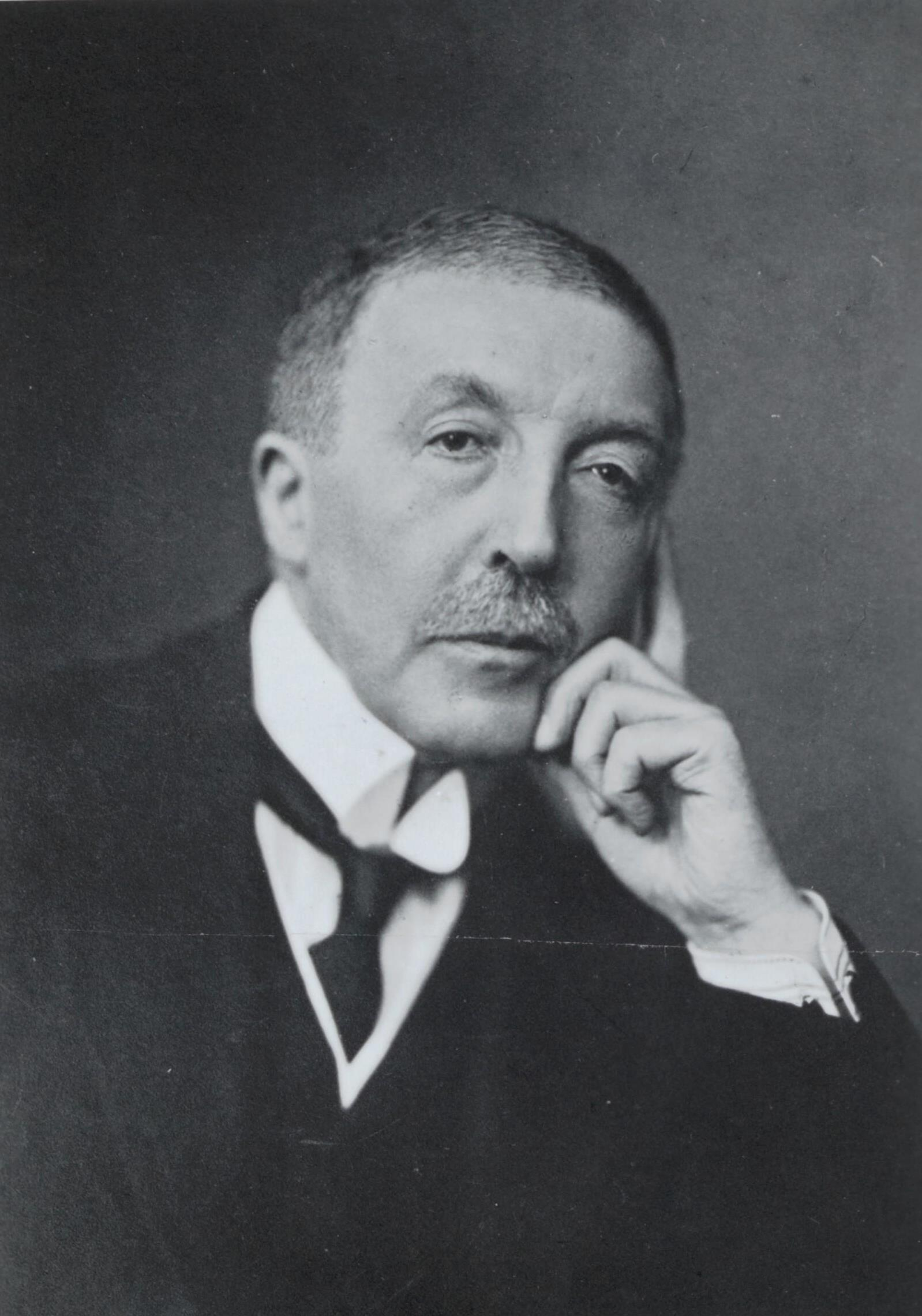 W.L. baron de Vos van Steenwijk (1859-1947). Voorzitter Eerste Kamer der Staten-Generaal 1929-1946 (Nederland)